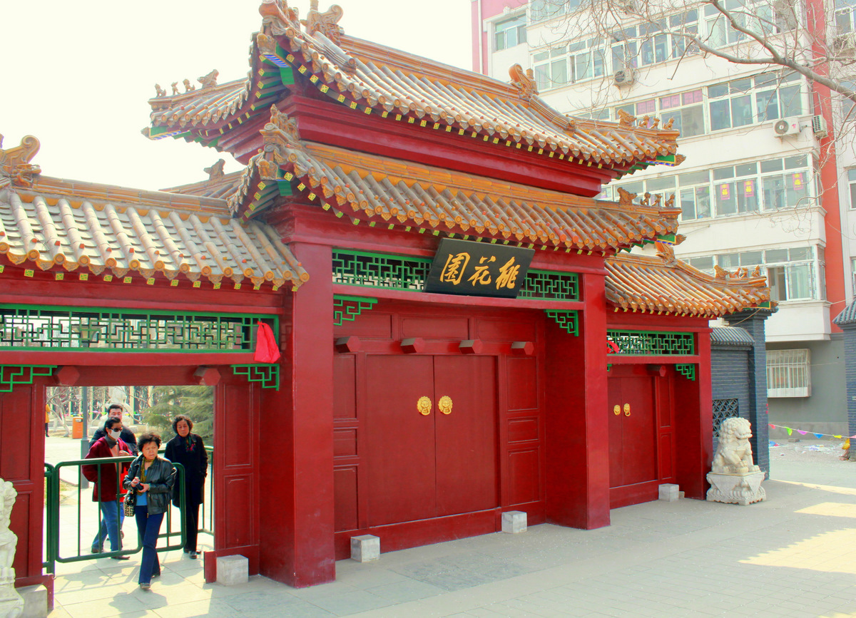 tianjin peach blossoms garden